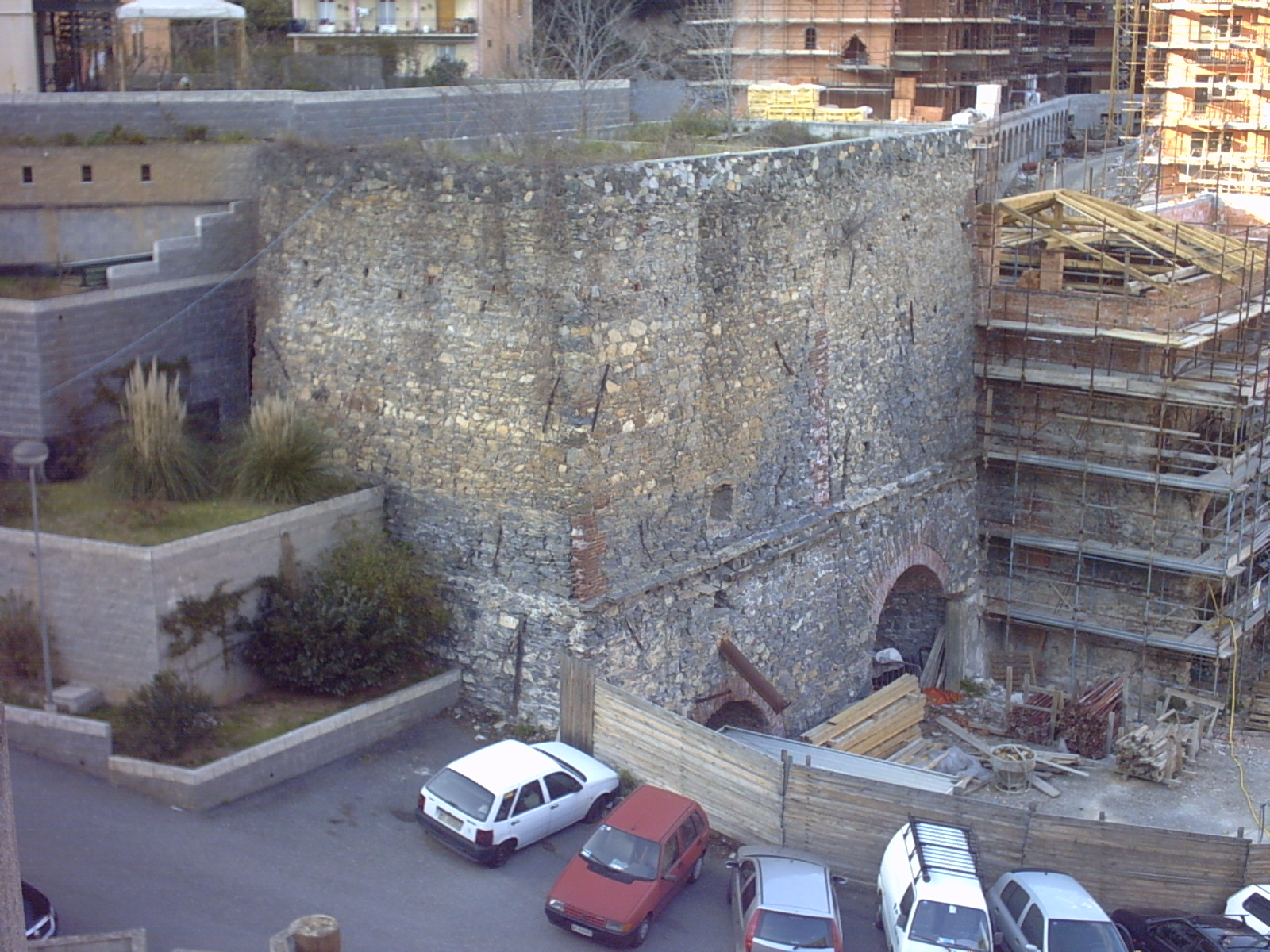 fornace per la calce a Cogoleto (Genova)